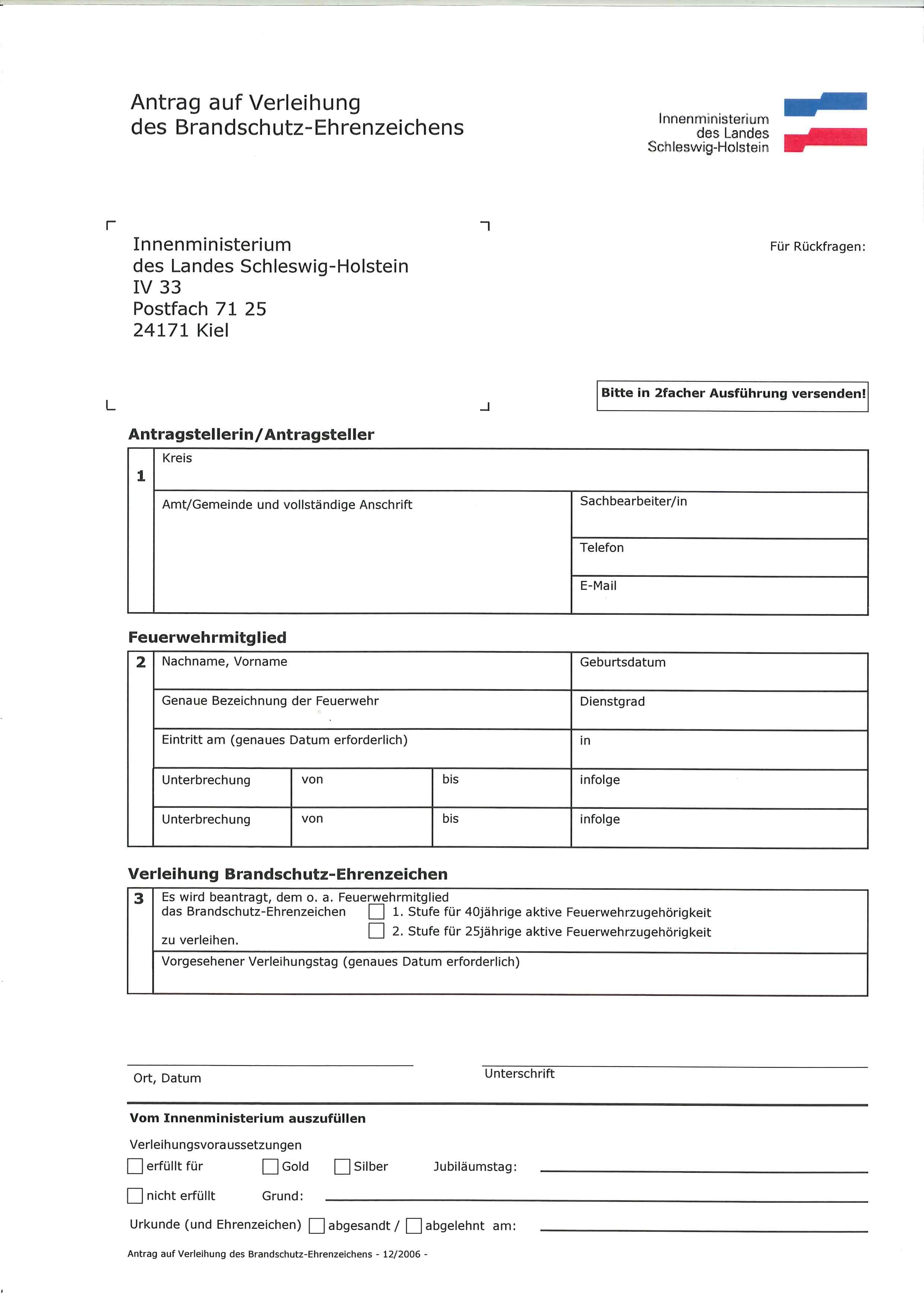 Antrag des Brandschutz-Ehrenzeichens des Landes Schleswig-Holstein